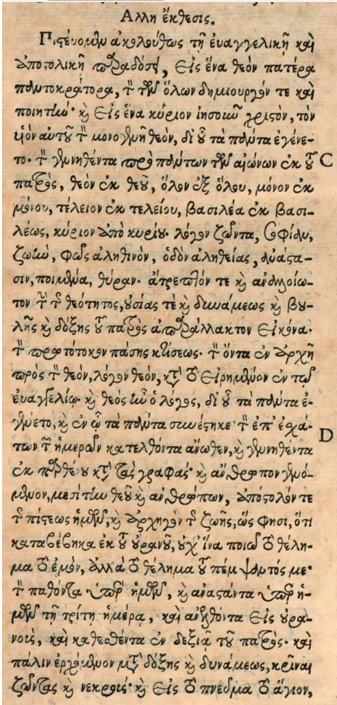 Символ веры Лукиана. Книга: Socrates scholasticus et Sozomenus, Hermias Ekklesiastikē Historia. Historia Ecclesiastica. Henricvs Valesivs Græcum textum collatis Mss. Codicibus emendauit, Latinè vertit, & Annotationibus illustrauit. Adjecta est ad calcem disputatio Archelai Episcopi aduersus Manichæum Parisiis: Antonius Vitré; 1668